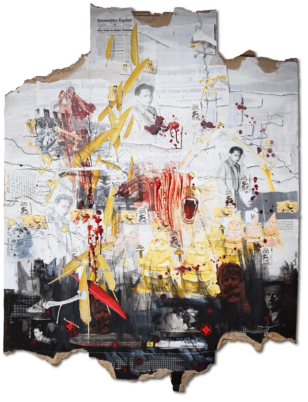 Herrenrasse XLIII, Herschel und Ernst, 2016, 160 x 144cm, Mischtechnik (Collage, Acrylmalerei und Blut) auf Wellpappe